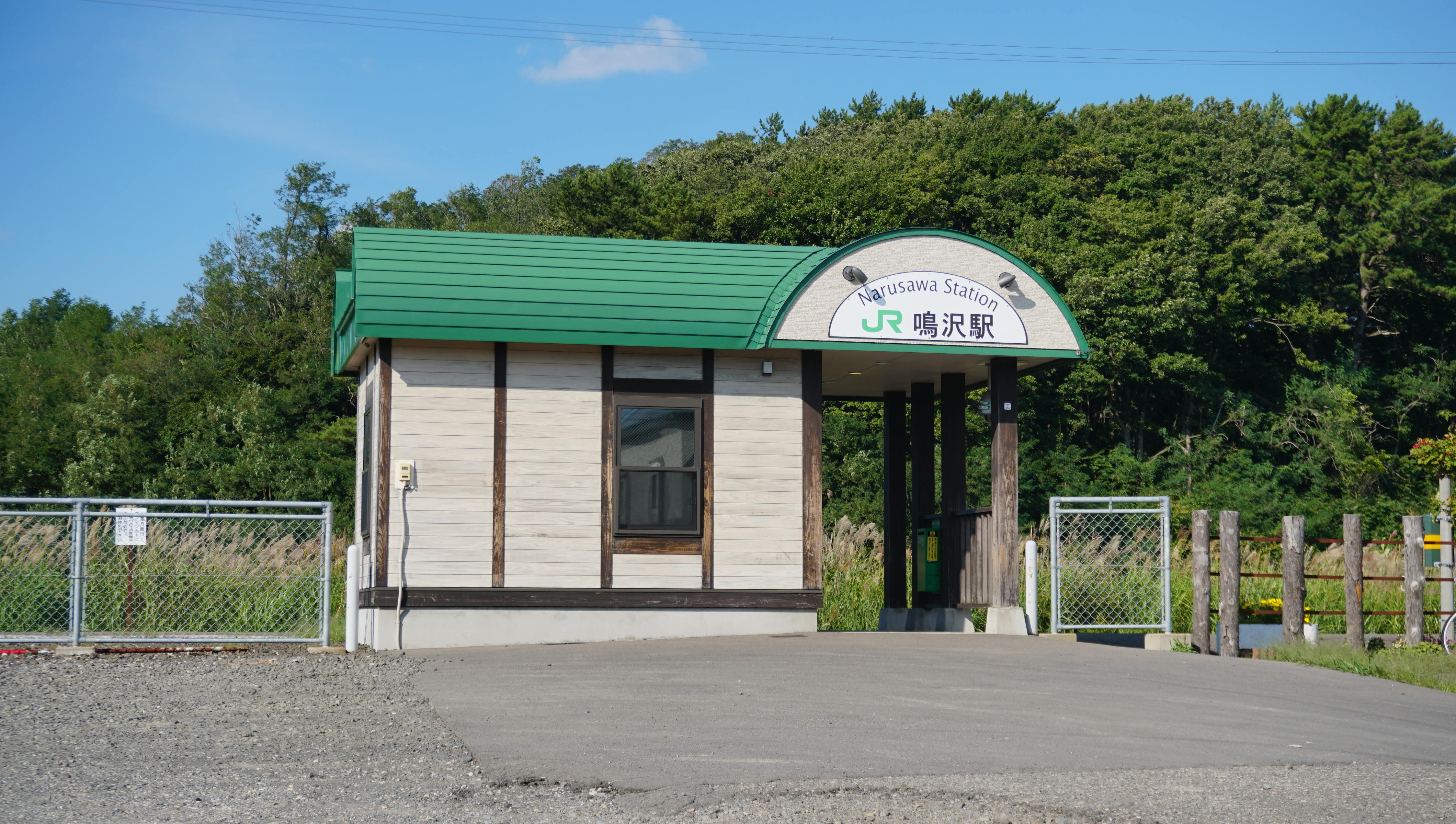 五能線 鳴沢駅（青森県西津軽郡鰺ヶ沢町）